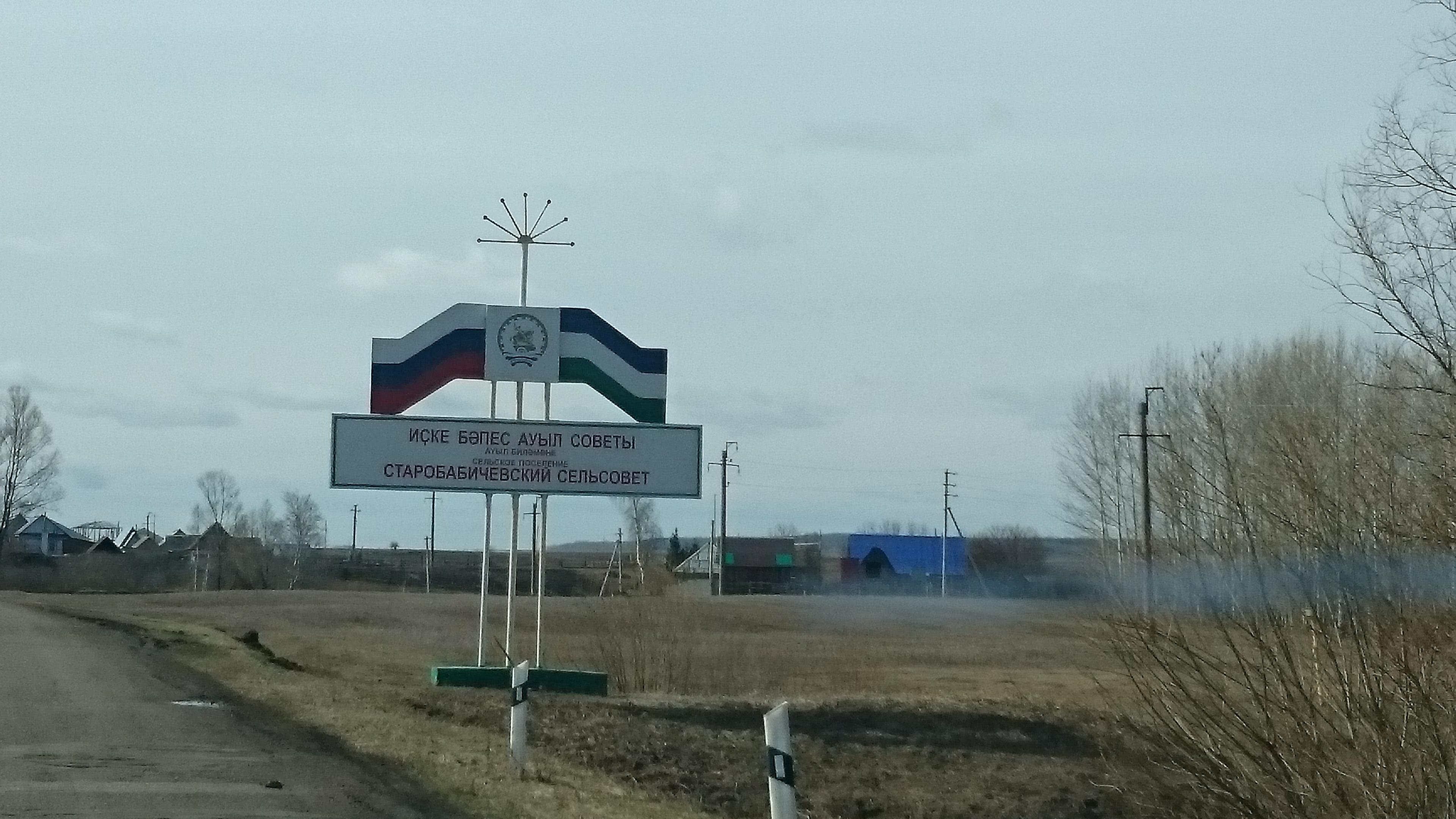 Во время празднования 10-летия Башкирской Википедии